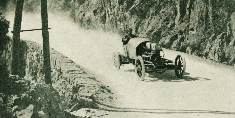 Louis Rigolly vainqueur du Meeting de Nice, en avril 1904 (RM sur le kilomètre lancé à 152.542 kmh) - La Vie au Grand Air du 7 avril 1904, p.264